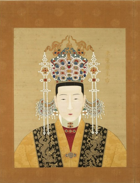 中文（中国大陆）: 作者已经去世超过200年，作品已经进入公有领域